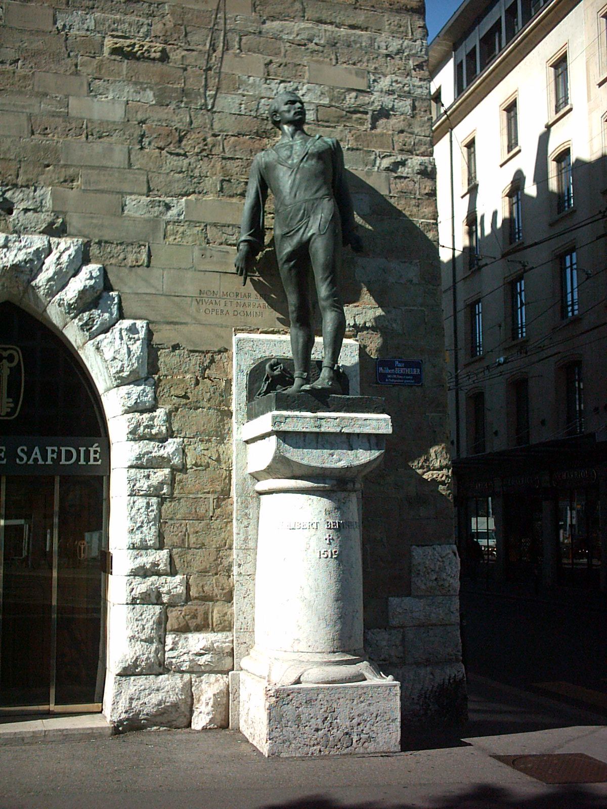 Statue de Philibert Berthelier à Genève (Suisse)